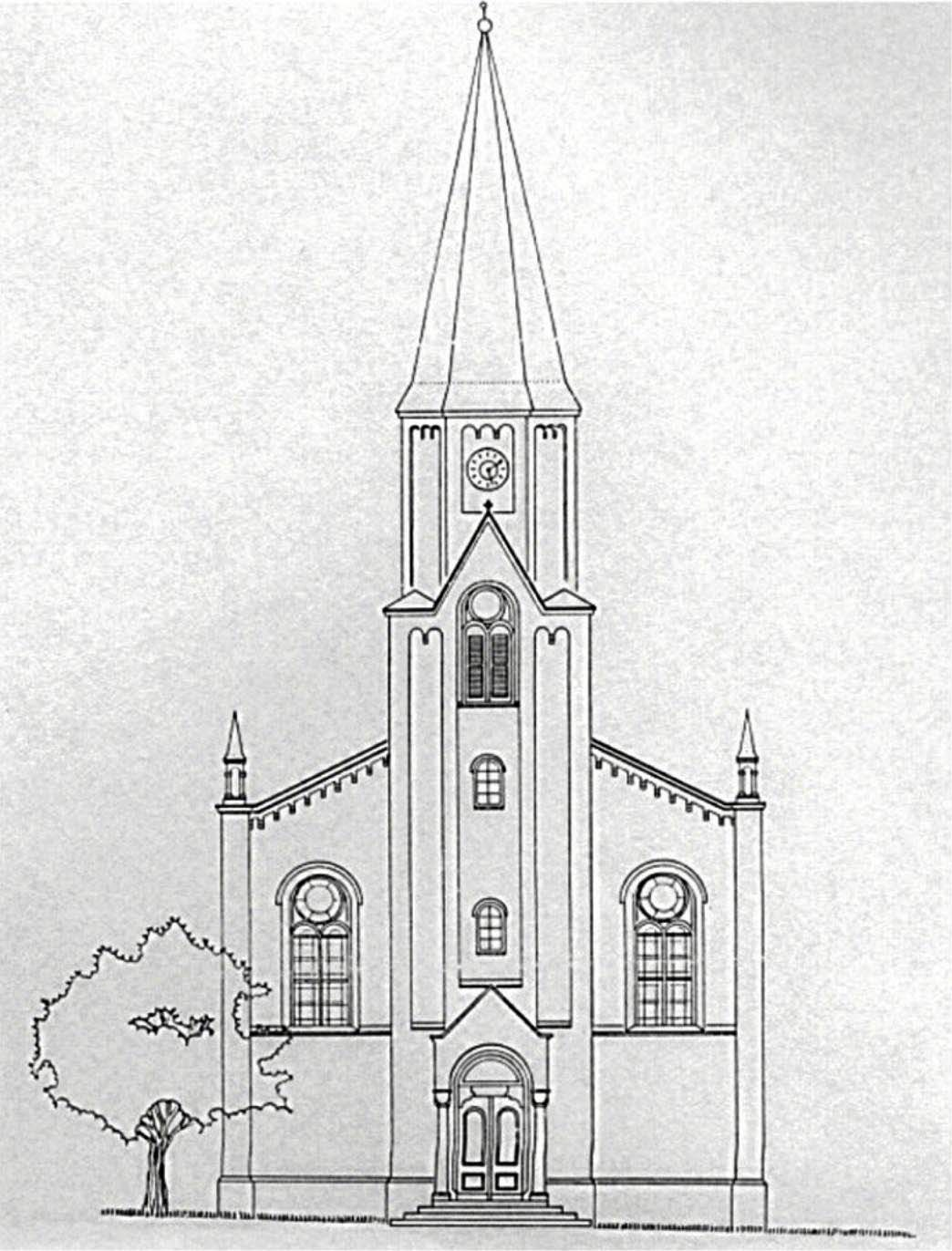 Entwurf des Architekten F. A. Stüler für die Evangelische Kirche Leun-Biskirchen, Lahn-Dill-Kreis, Hessen, Deutschland